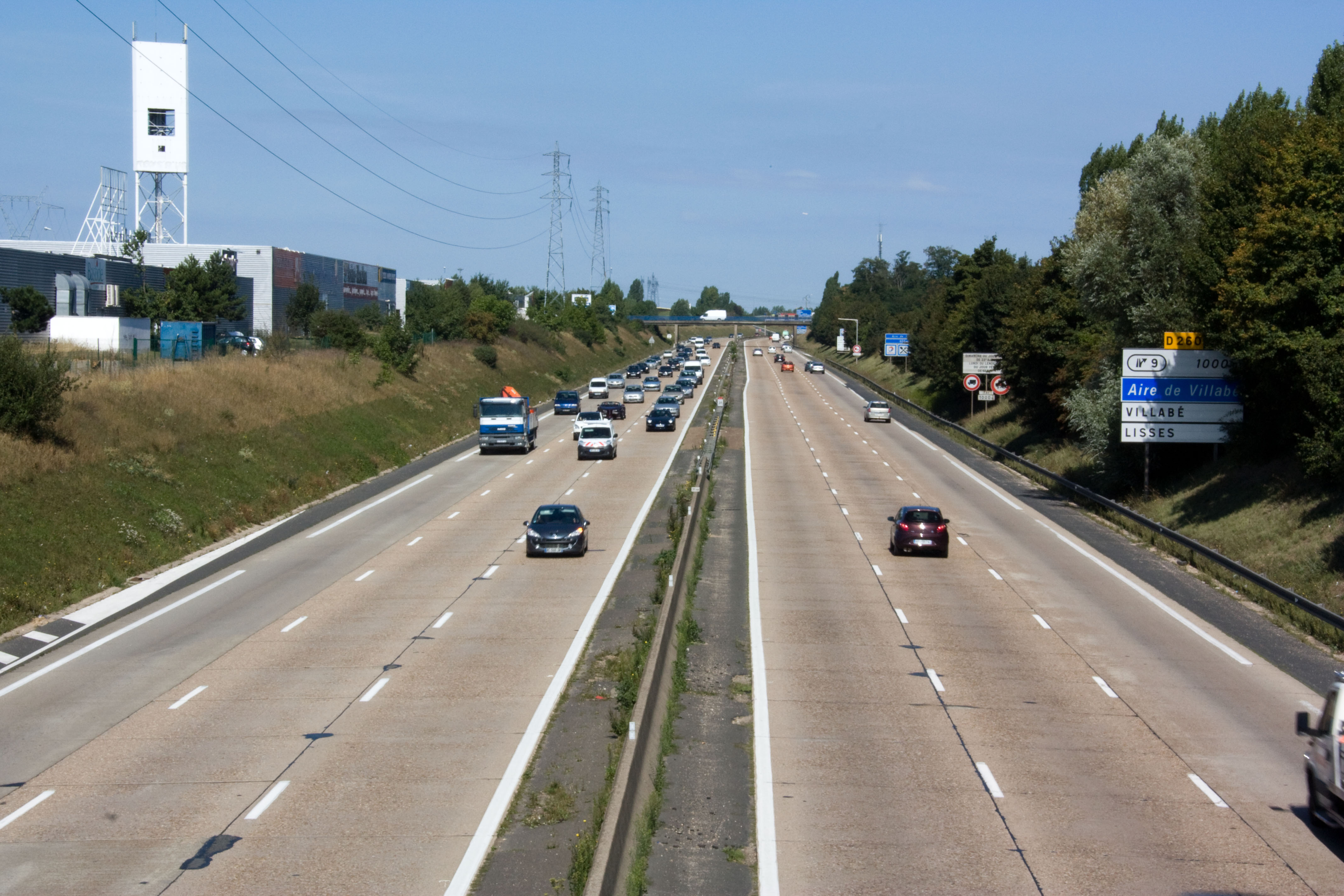 Autoroute A6 à Villabé, Villabé, Essonne, France